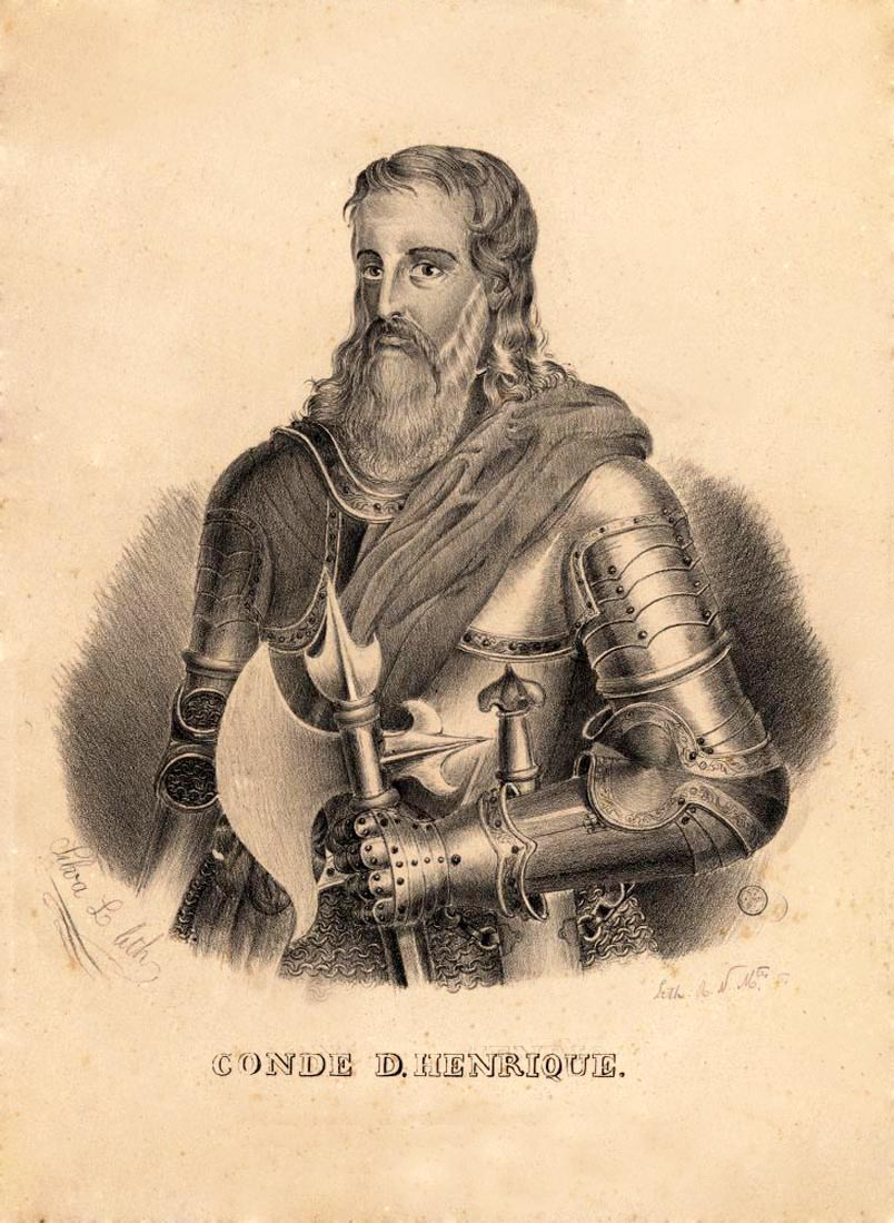 D. Henrique de Borgonha, Conde de Portugal.